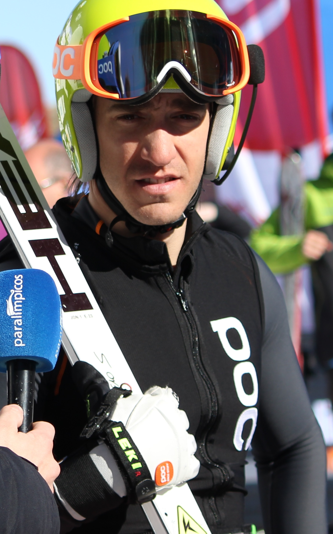 Jon Santacana en el Campeonato del Mundo IPC 2013 de La Molina, España.